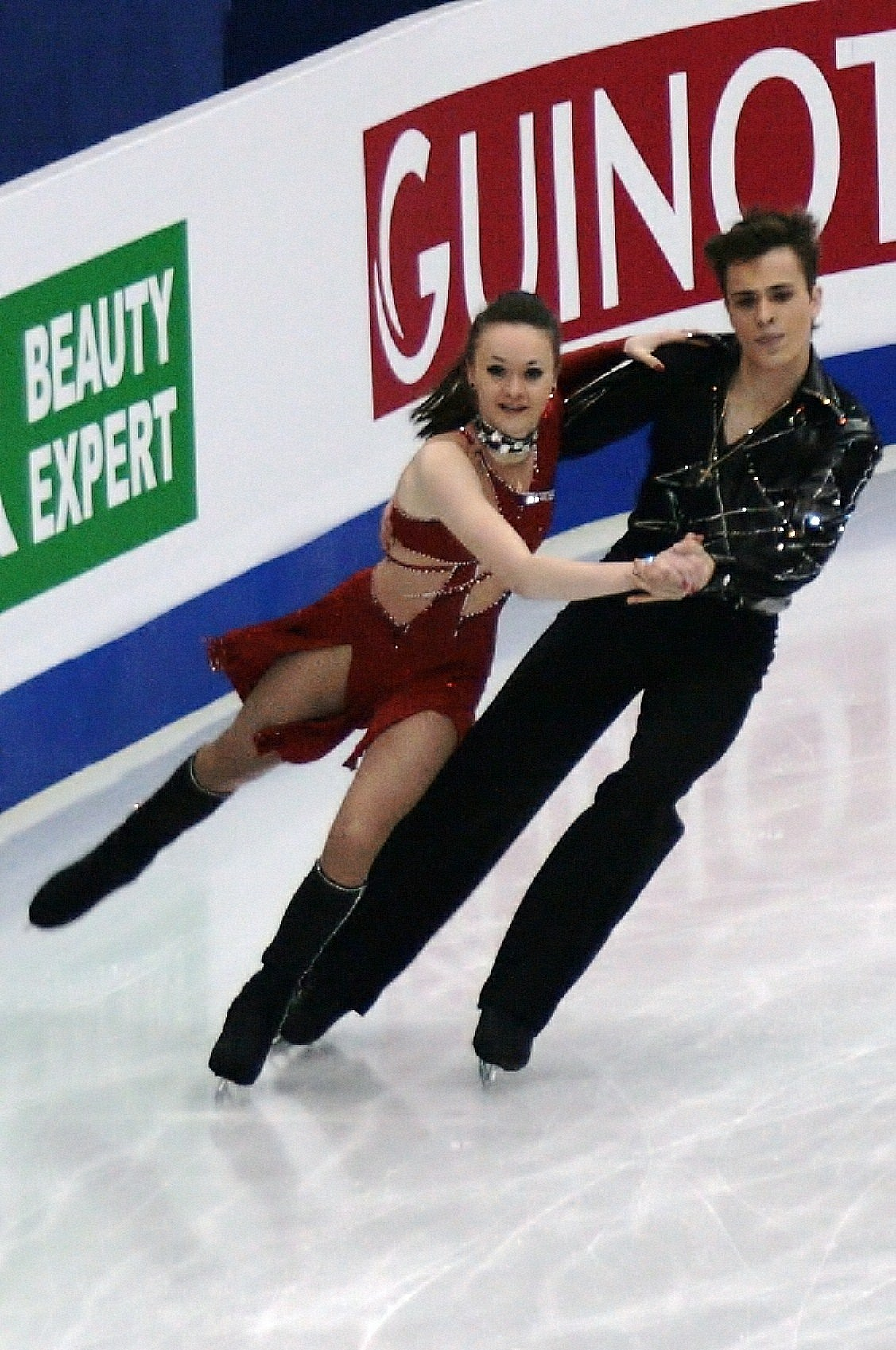 Анна Нагорнюк и Виктор Коваленко (Узбекистан) на чемпионате мира по фигурному катанию 2012.